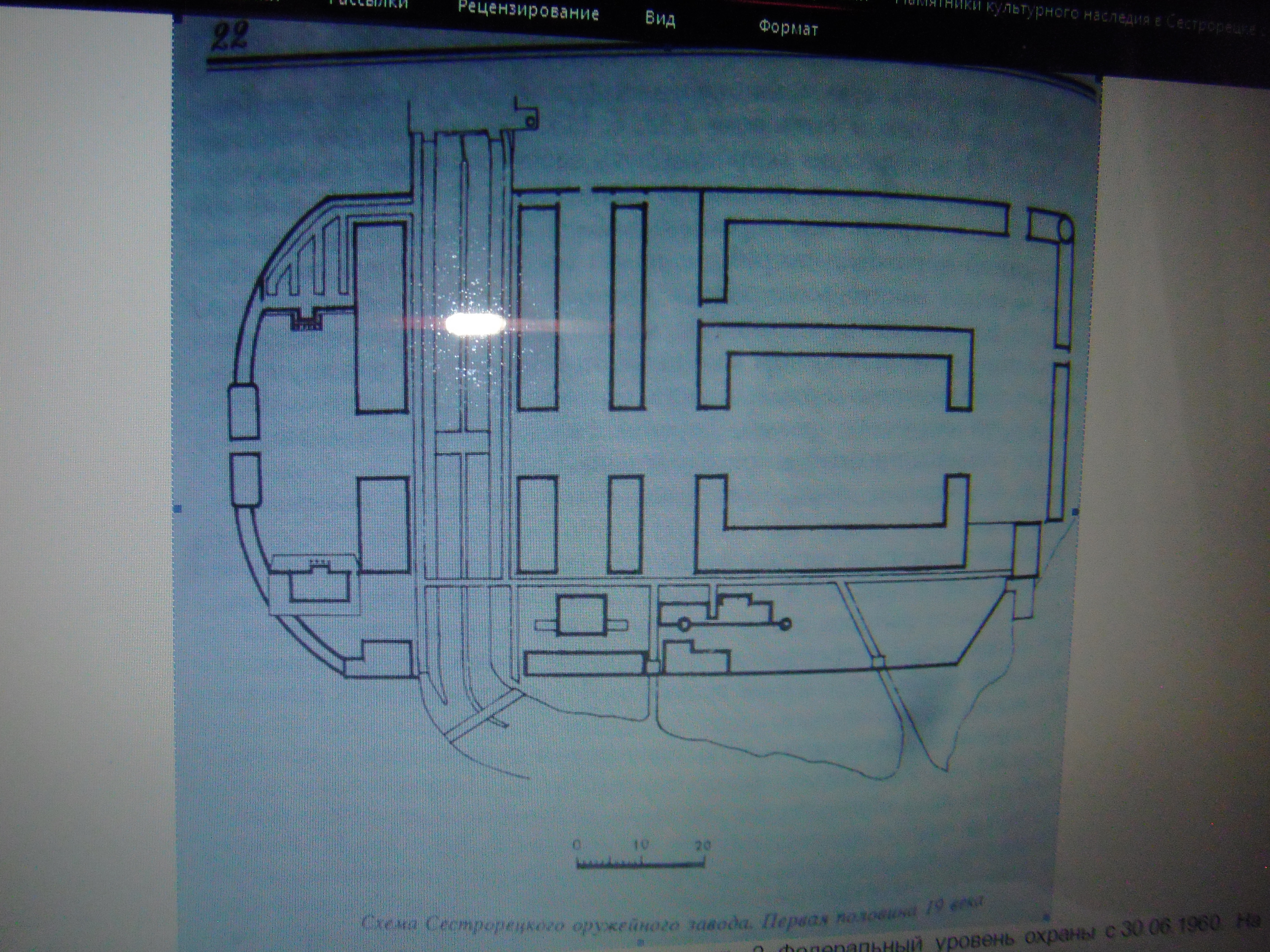 Сестрорецк. Оружейный завод. План соляного канала.